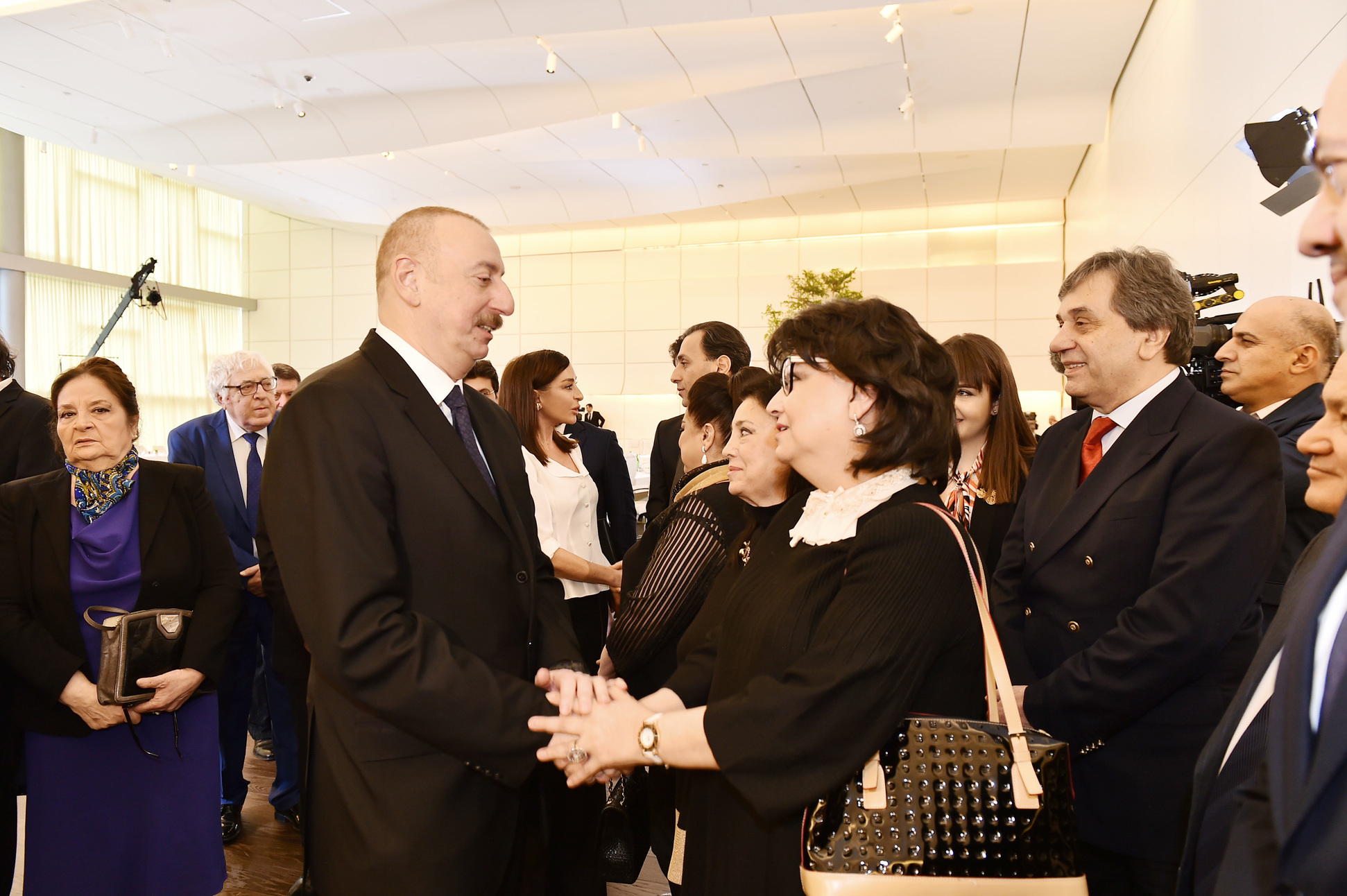 Mədəniyyət və incəsənət xadimlərinin prezidentlə görüşü